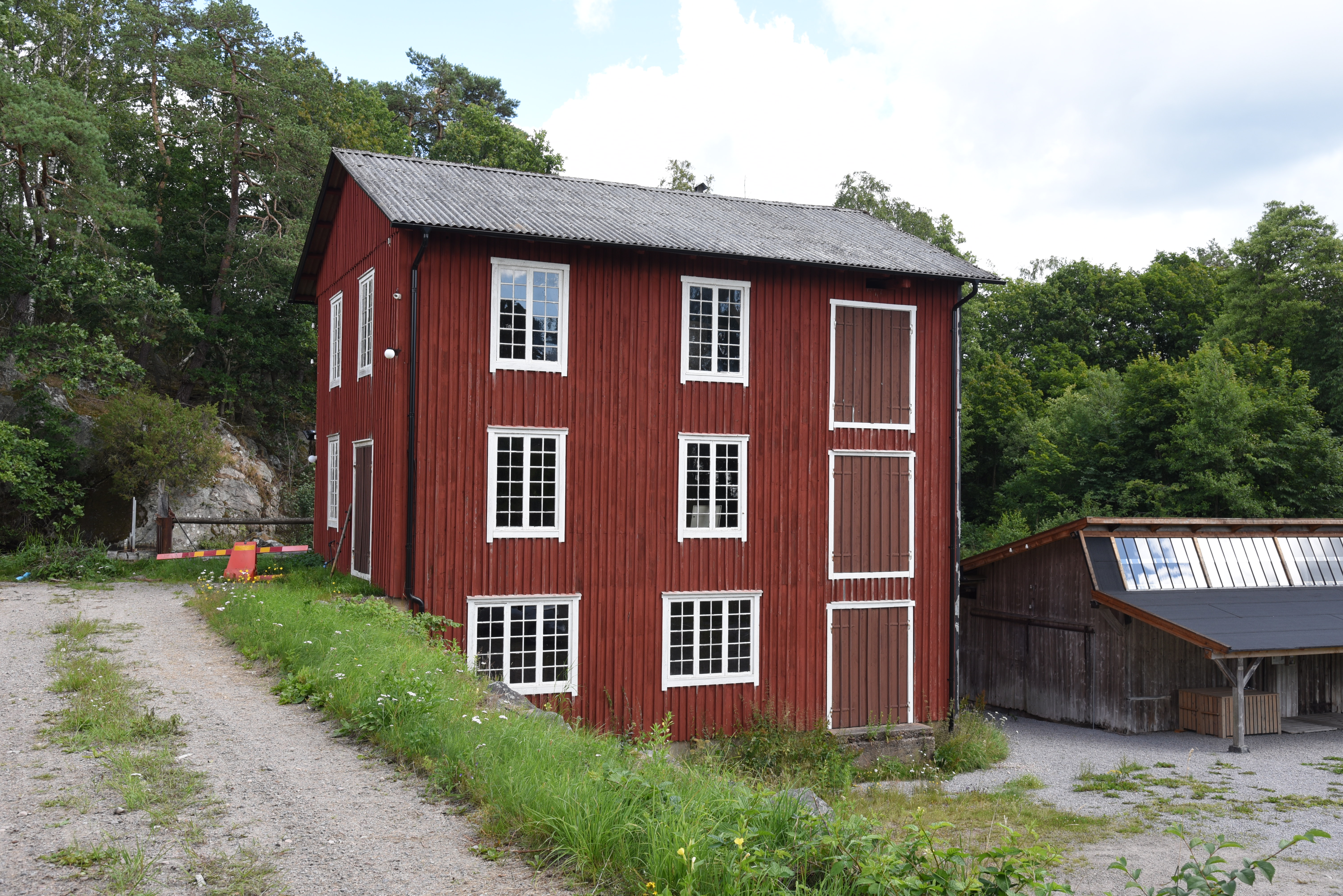 Tunnbinderiet i Knobesholm, Asige socken, Falkenbergs kommun.